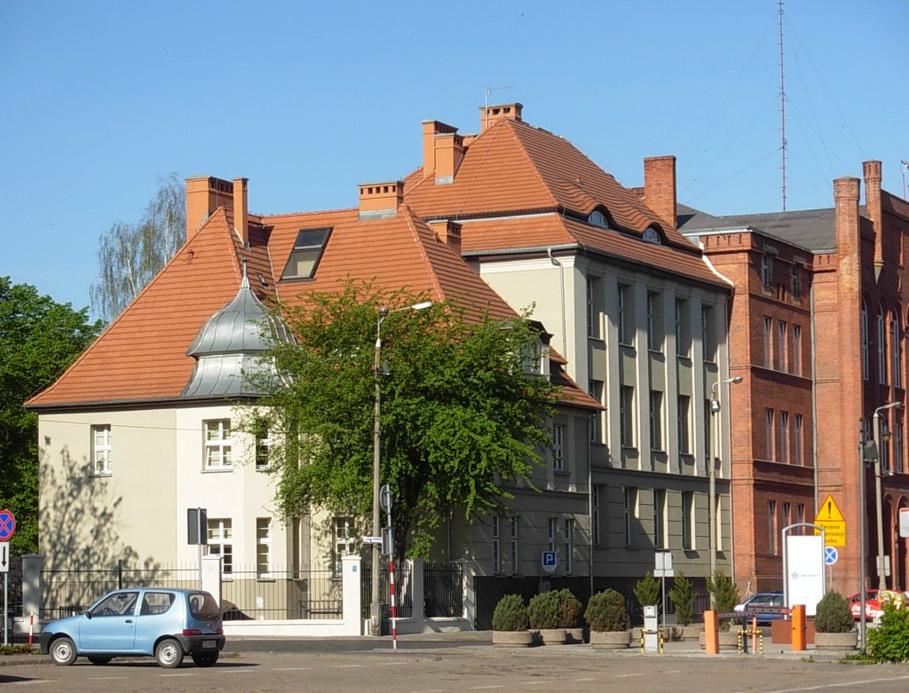 Budynek Seminarium Duchownego w Bydgoszczy, 1858 r.